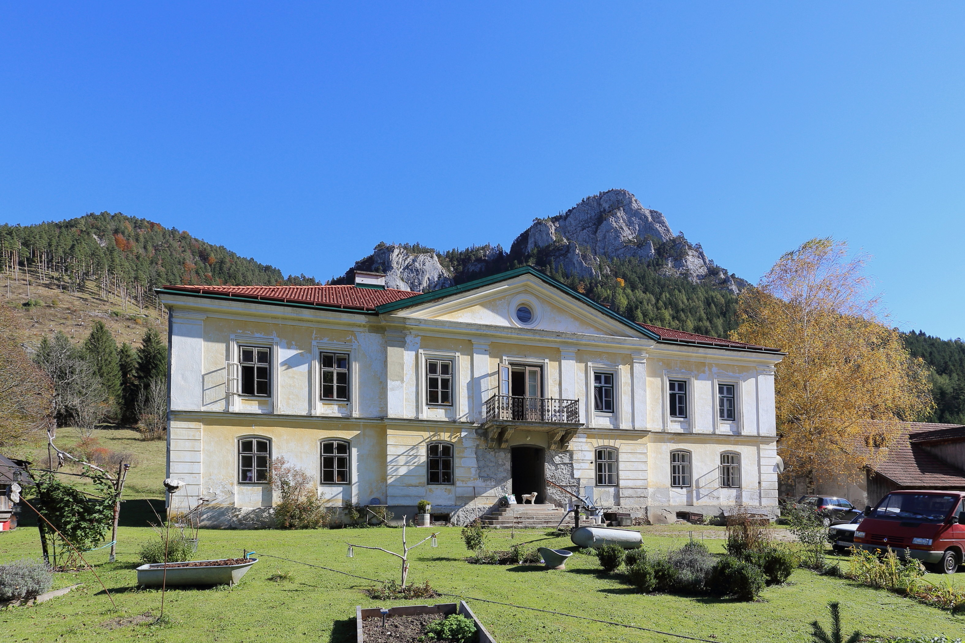 Ehemaliges Herrenhaus des ehemaligen Hammerwerkes "Im Baumgarten" in der niederösterreichischen Marktgemeinde Schwarzau im Gebirge. Das zweigeschossige Gebäude mit Walmdach und übergibelten Mittelrisalit wurde 1855 errichtet.